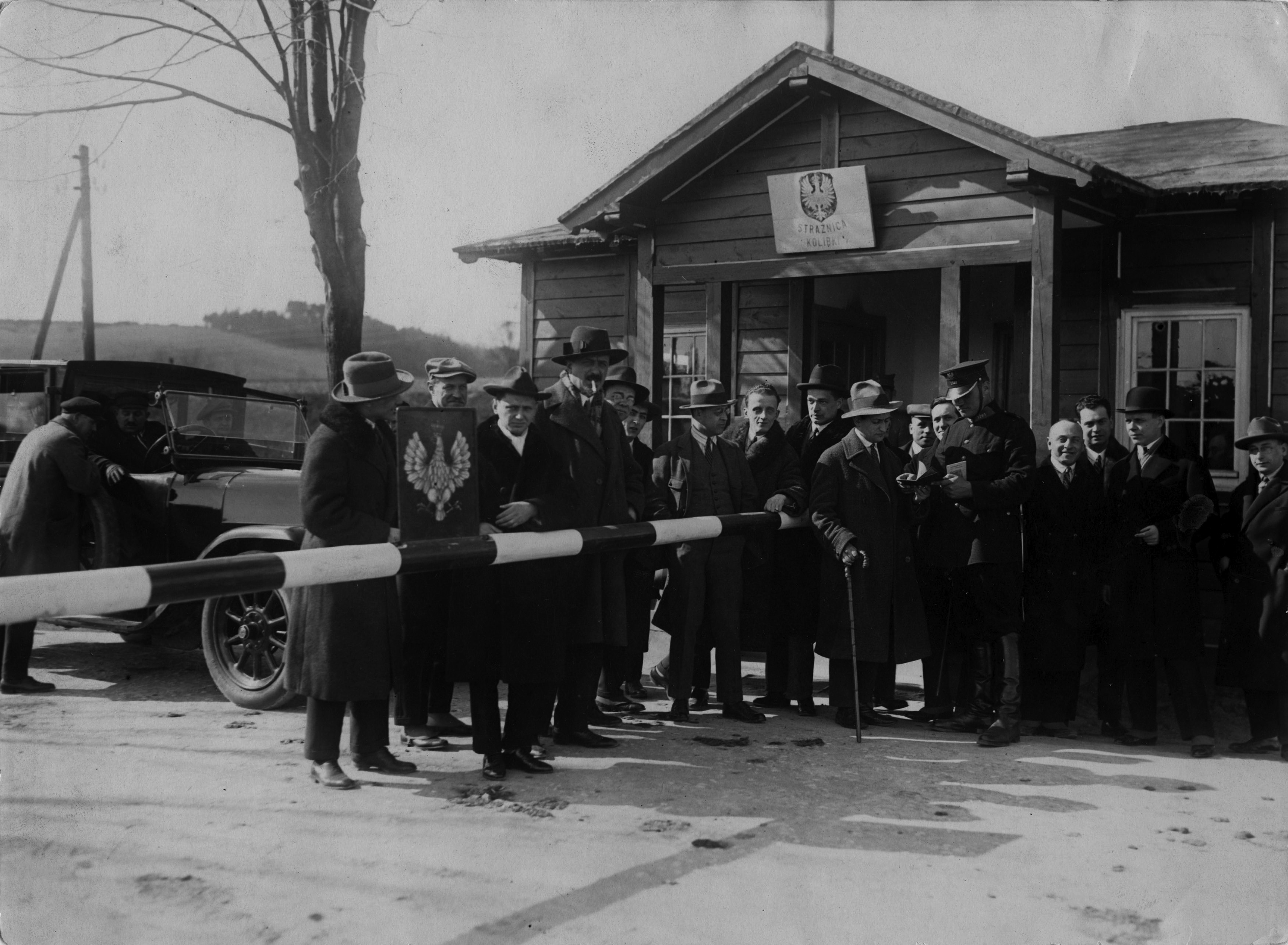 Posterunek Straży Granicznej w Kolibkach (granica Polski i Wolnego Miasta Gdańska).